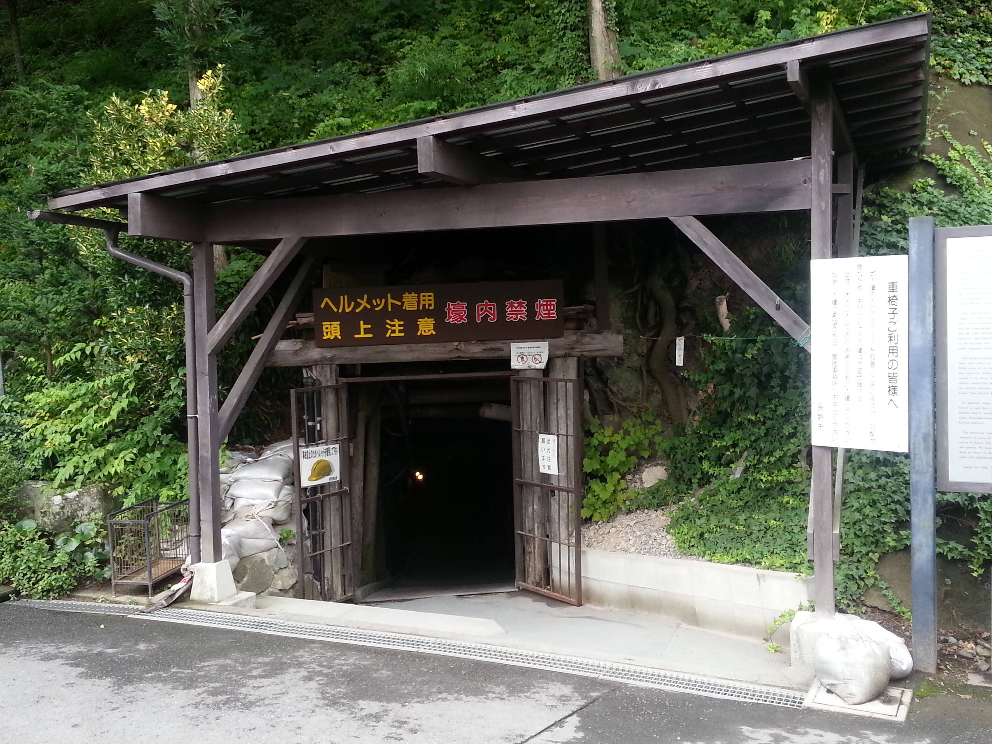 松代大本営跡のうち、一般無料公開されている松代象山地下壕の入り口。